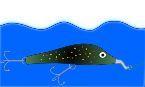 Tekening van een plug, let op de lip die de plug naar beneden duwt.